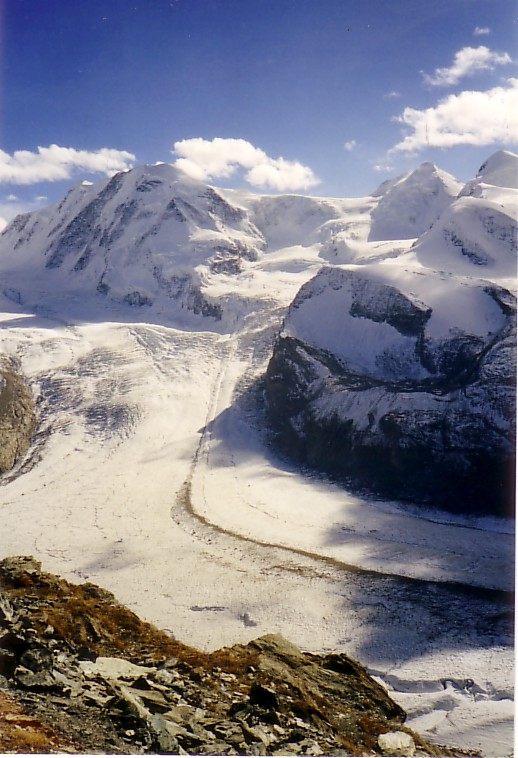 Der Grenzglescher vom Gornergrat aus gesehen.